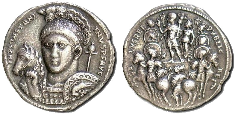 Porträt Konstantins auf der Vorderseite eines Silbermedaillons geprägt 313 in Ticium (Pavia). Am Helmbusch ist ein Christogramm ersichtlich.